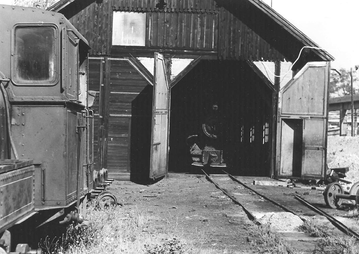 Reparaturwerkstatt der 'Borja'. Vorn links die Lok Nr. 1, deren Klien-Lindner Endachsen repariert wurden